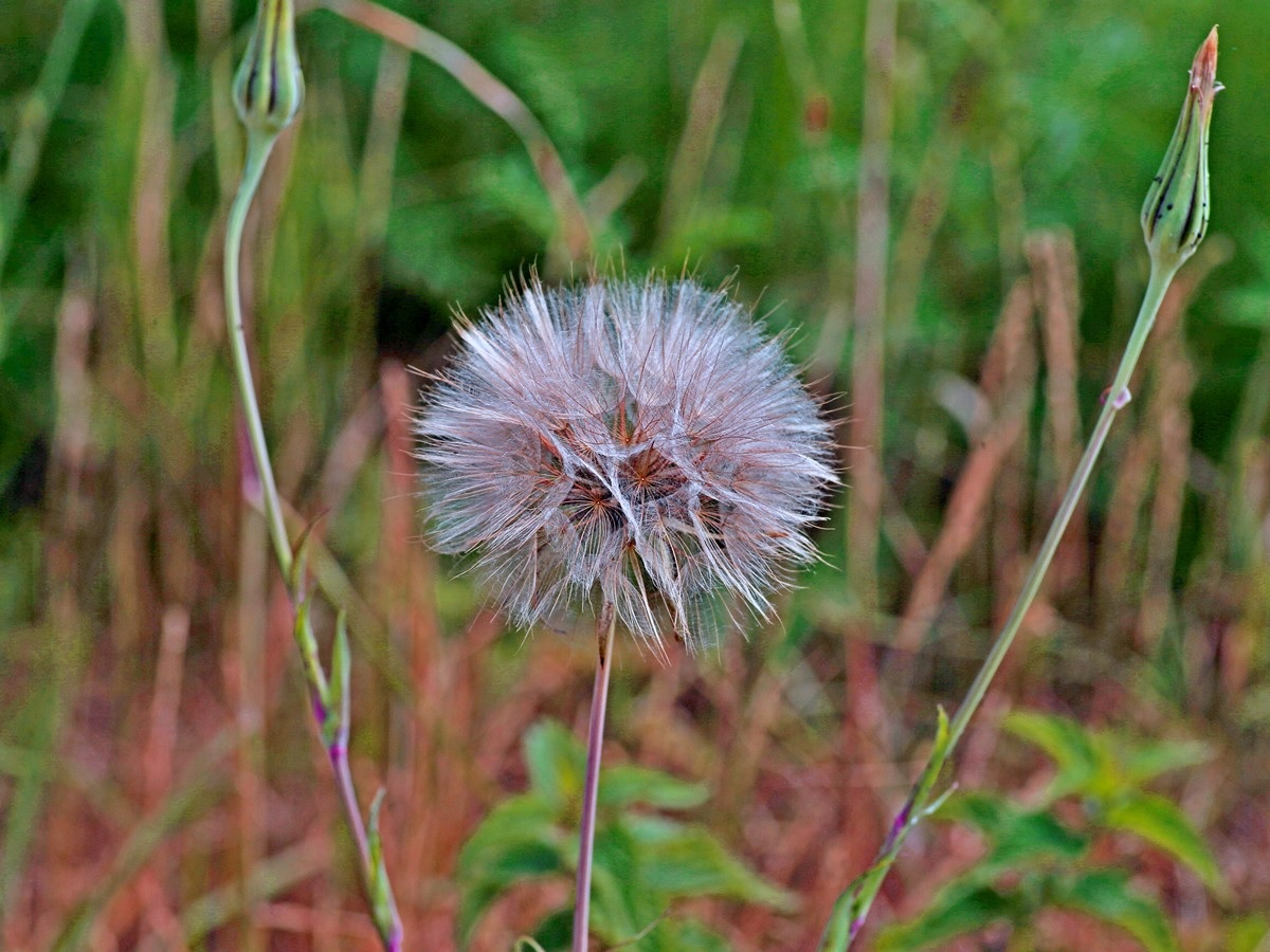 Fruchtstand des Wiesen-Bocksbarts